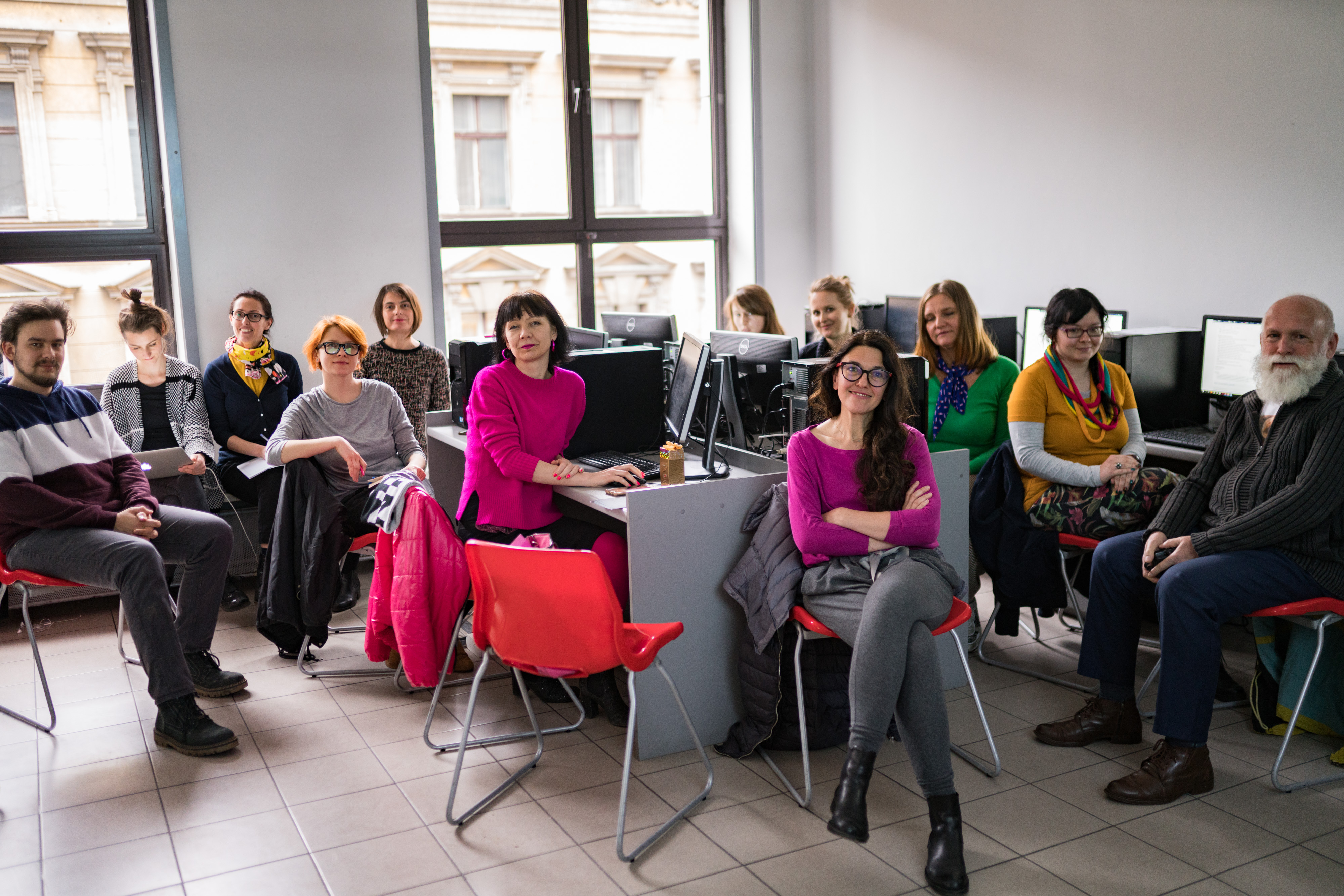 Zdjęcie przedstawia uczestniczki i uczestników szkolenia z edytowania Wikipedii organizowane w ramach akcji Rok kobiet z ASP, która wiąże się z faktem 100-lecia przyjęcia kobiet w poczet studentów, co nastąpiło 14 grudnia 1918 roku. Szkolenie odbyło się 22 marca w murach Akademii Sztuk Pięknych im. Jana Matejki w Krakowie. W szkoleniu wzięło udział 12 osób, podczas którego opublikowano 10 nowych artykułów.